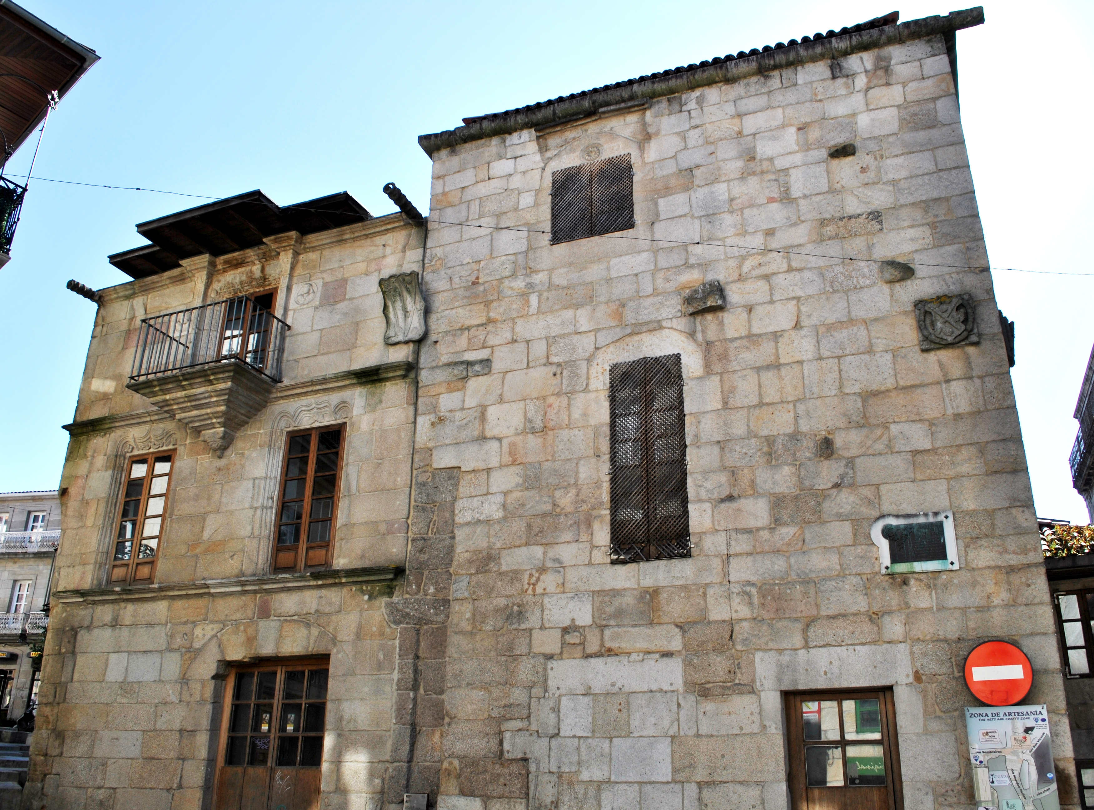 Véxase o título e as categorías.